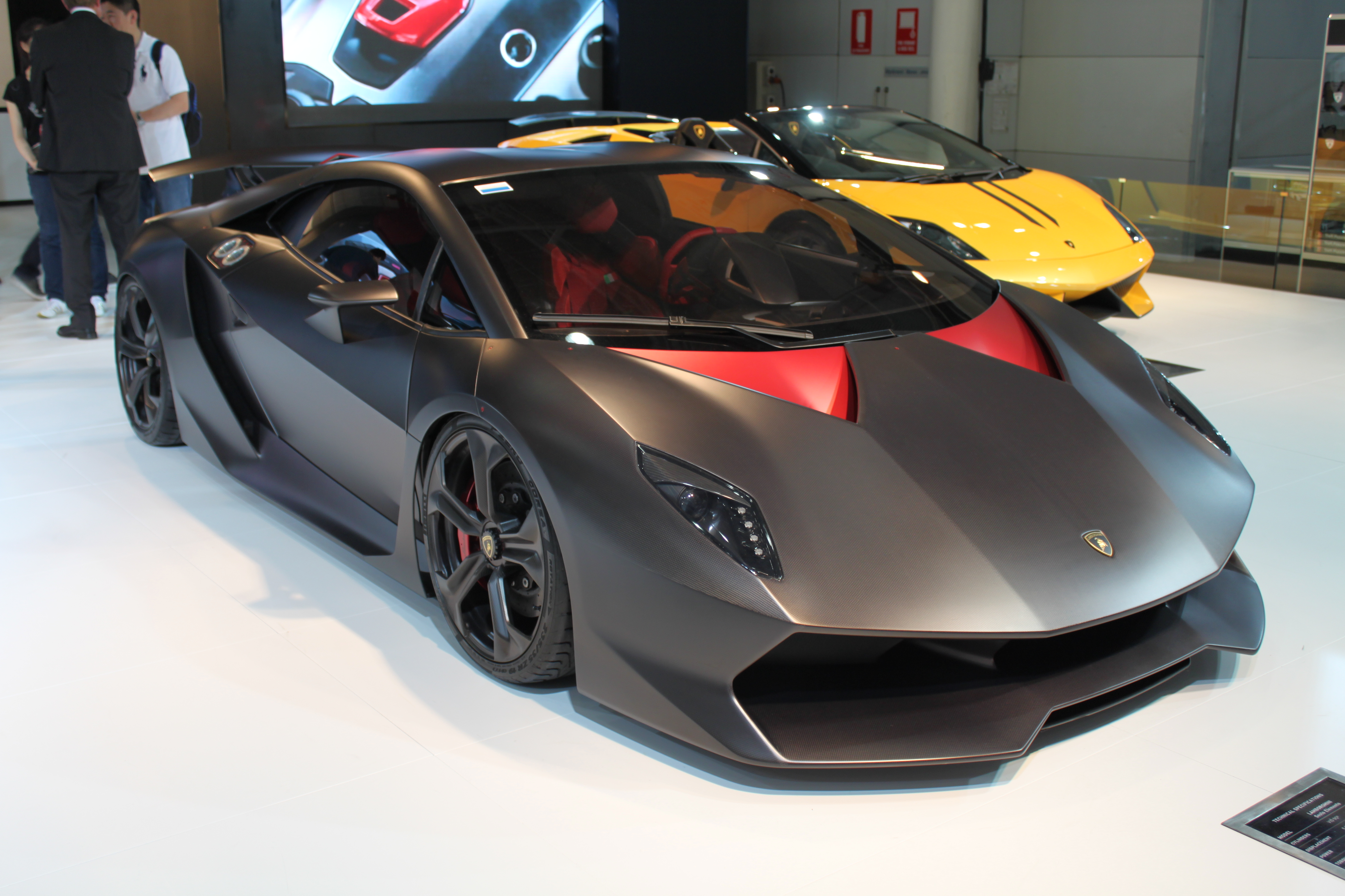 Lamborghini Sesto Elemento